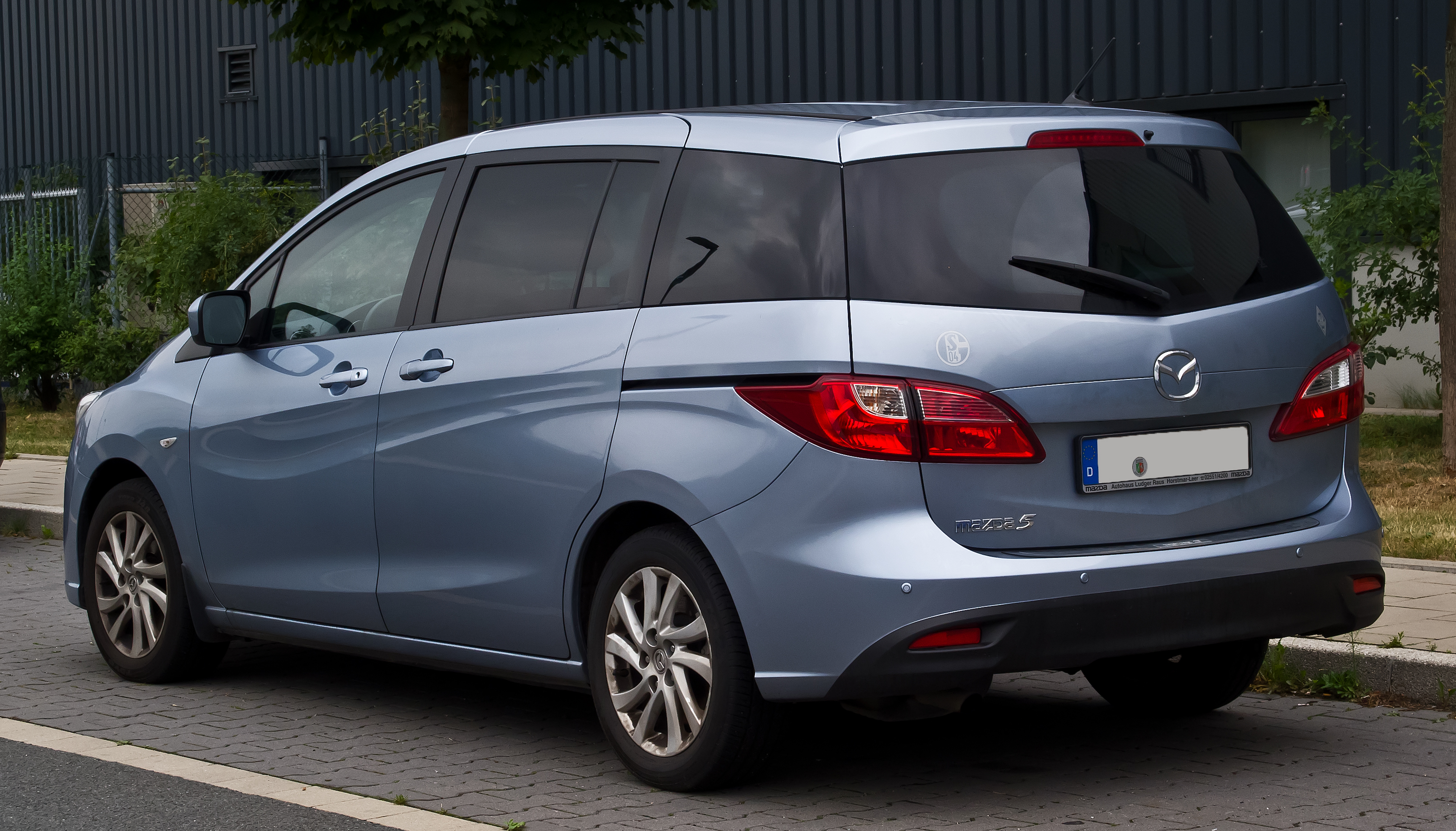 Mazda5 (II)